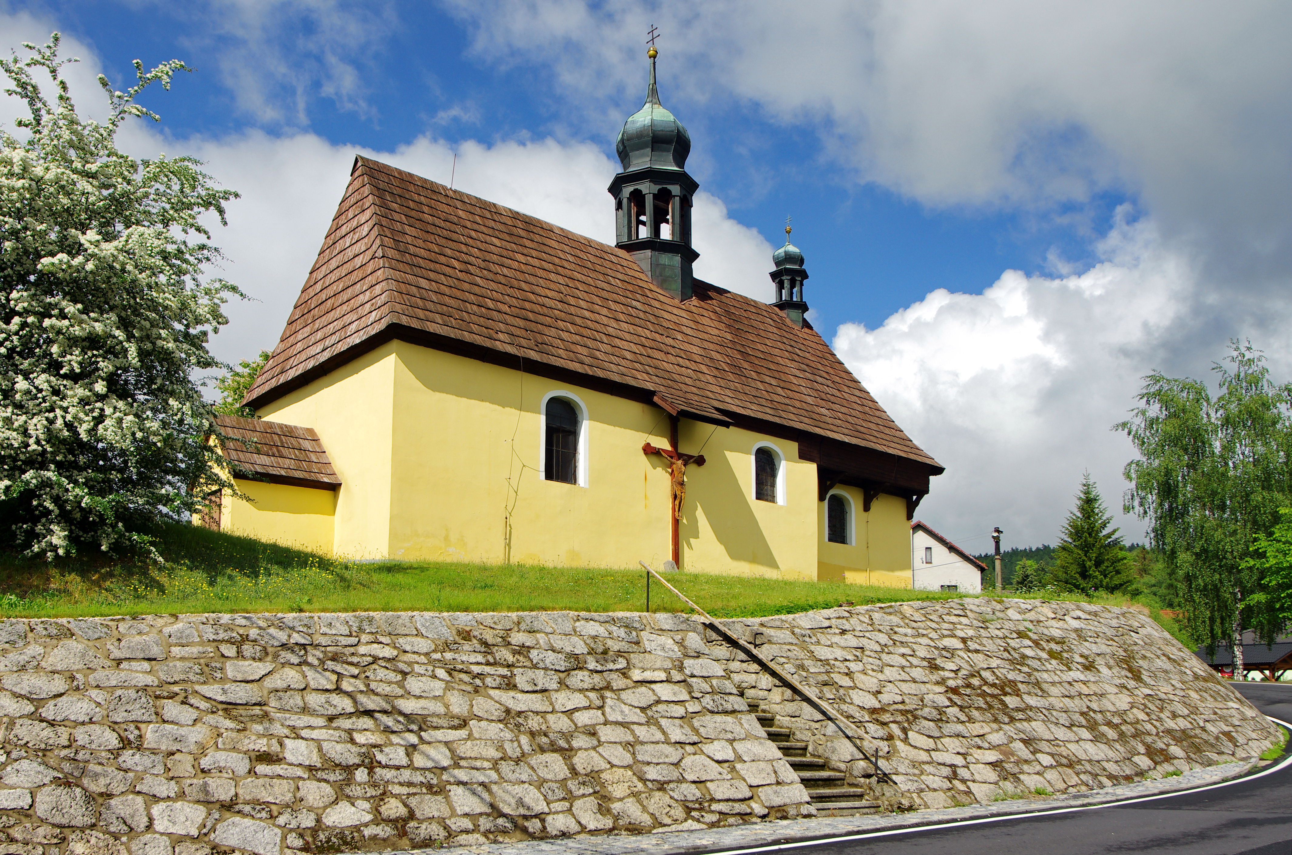 Kostel svatého Erharta, st. 24, Tatrovice.